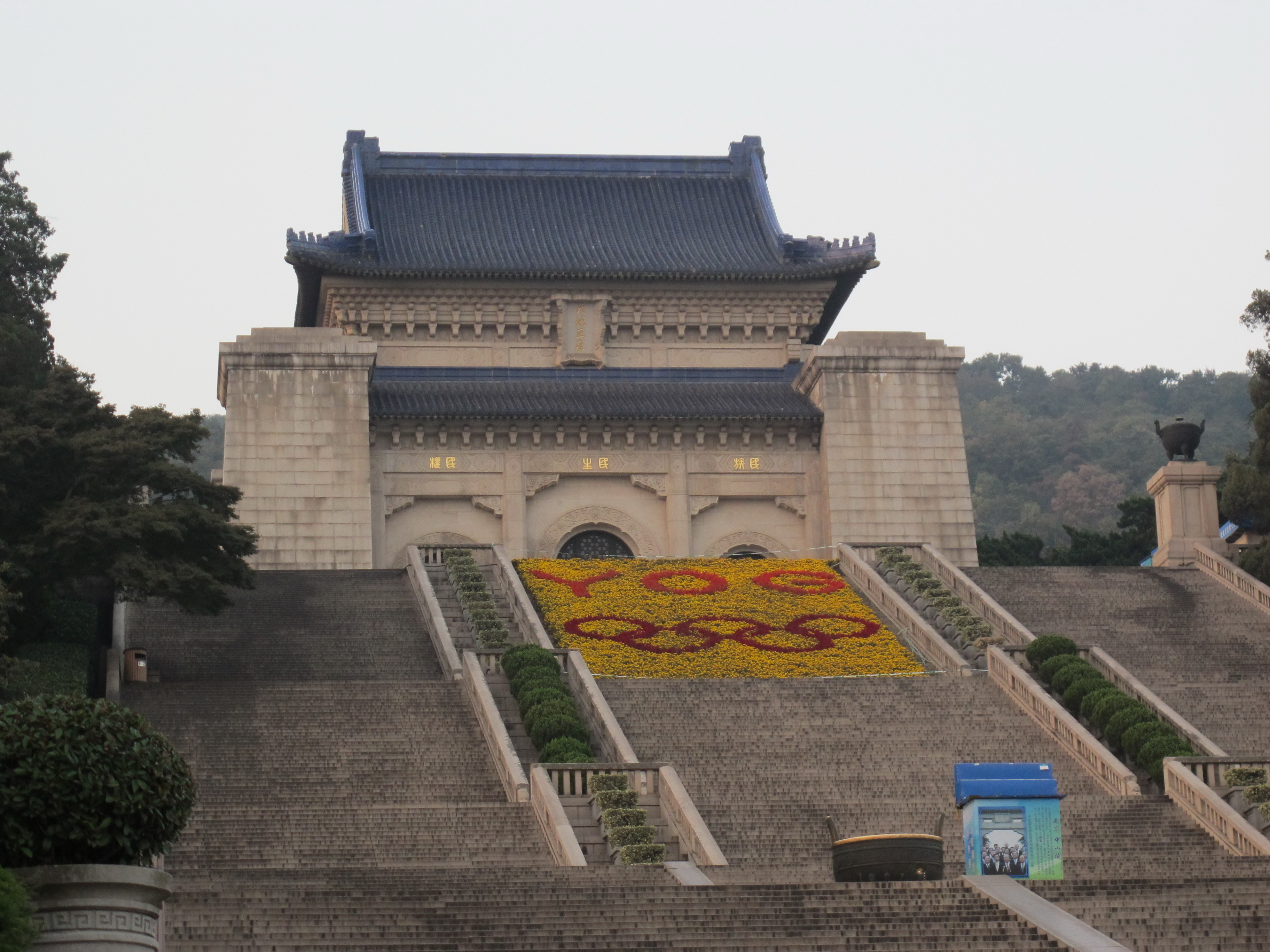 南京-中山陵